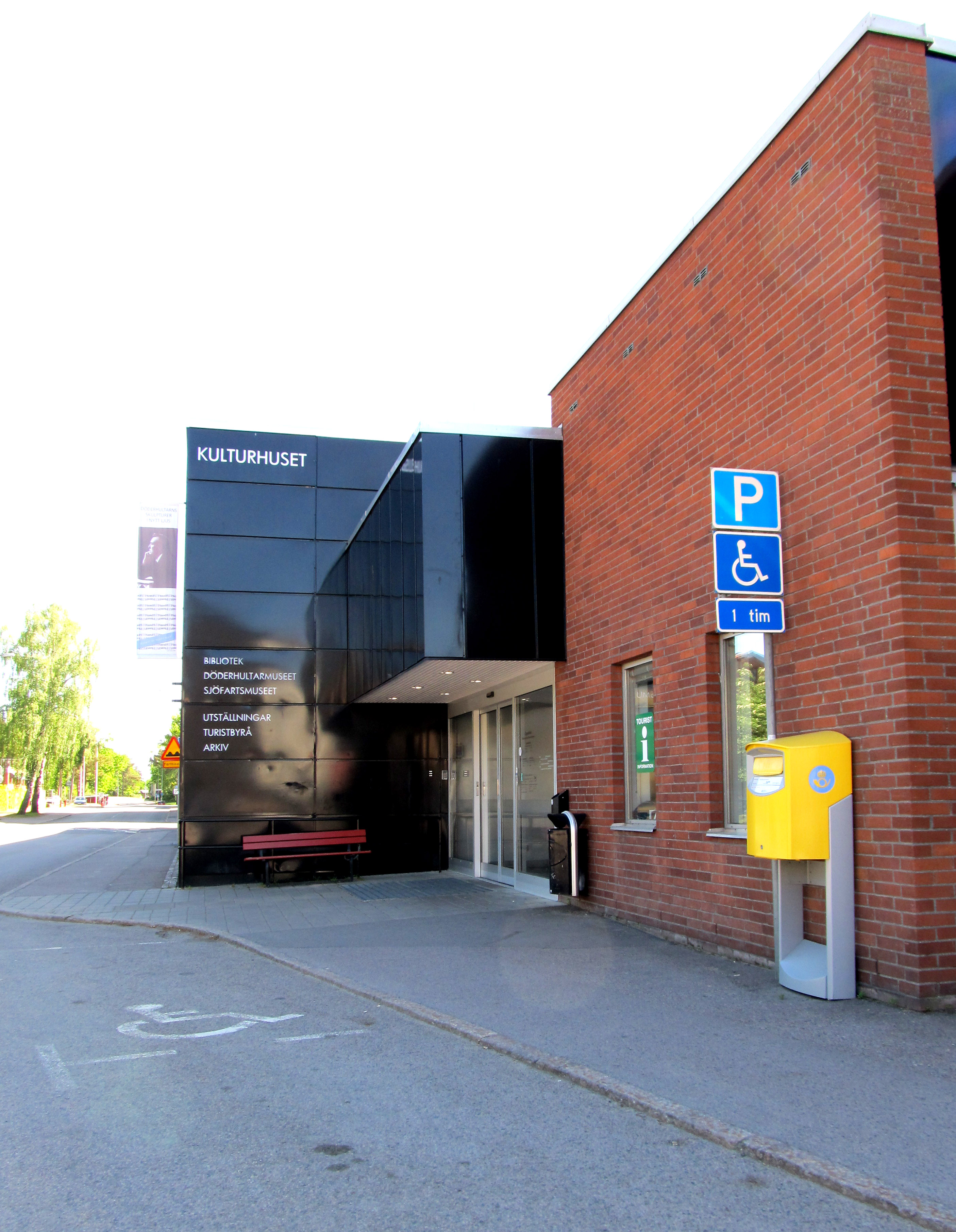 Kulturhuset i Oskarshamn. Inrymmer Döderhultarmuseet, Sjöfartsmuseet, turistbyrå och bibliotek.